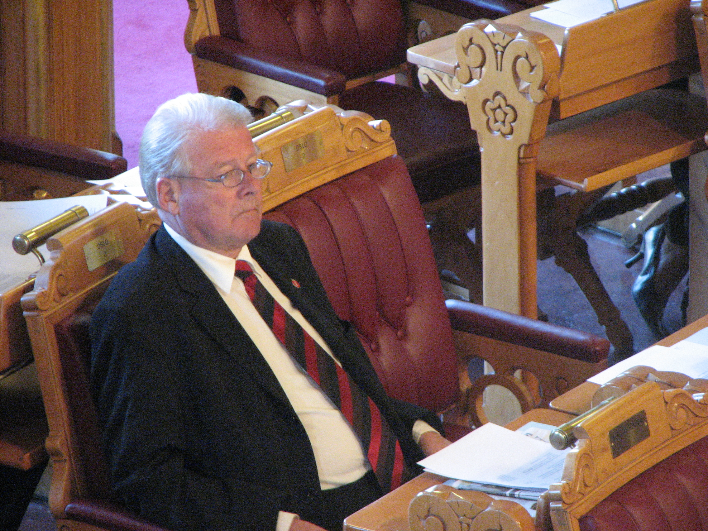 Stortingsrepresentant og stortingets visepresident Carl I. Hagen for Oslo Frp i Stortinget 12. februar 2009.